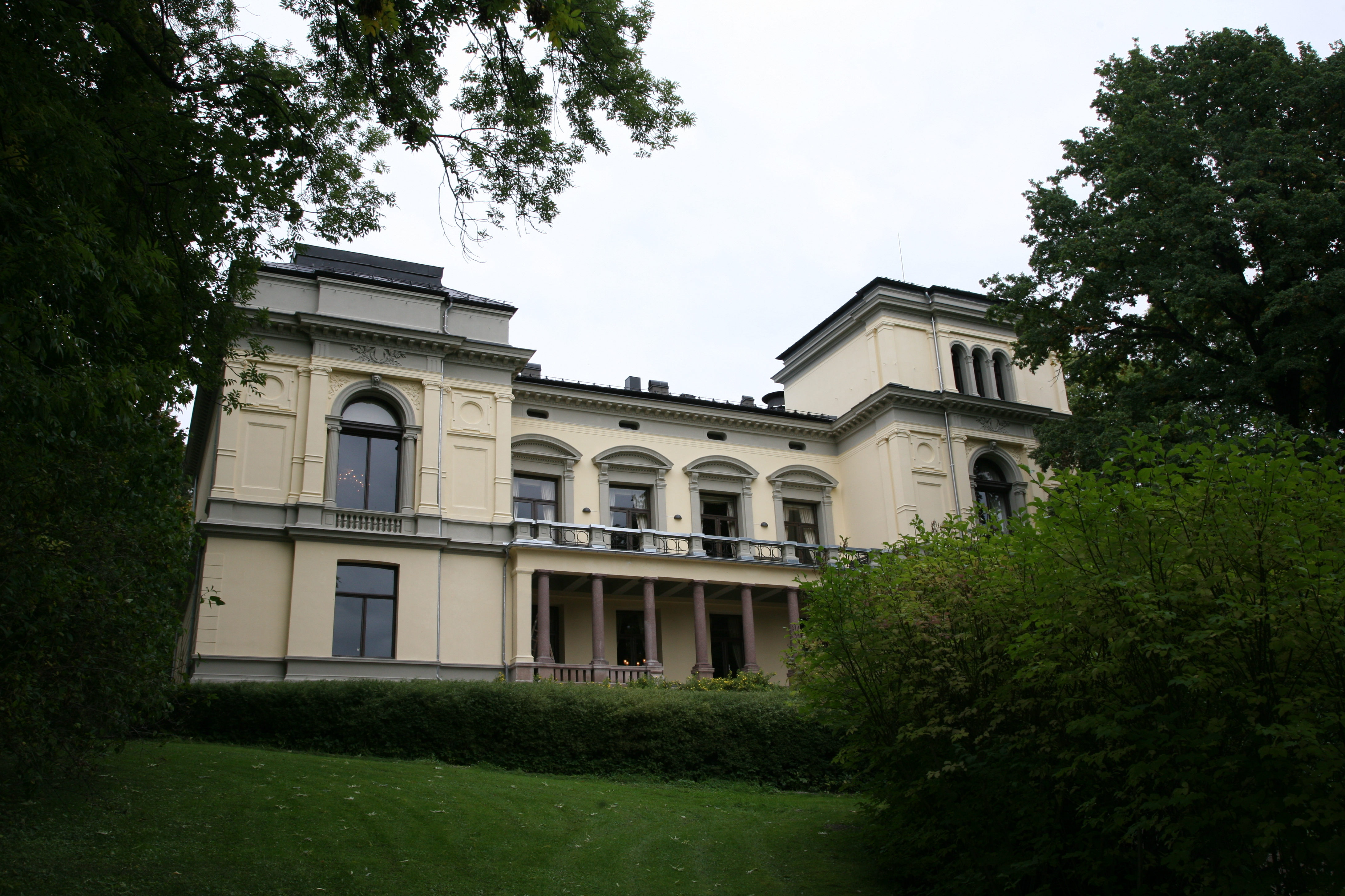 The building of Det Norske Videnskaps-Akademi in Drammensveien 78 in Oslo